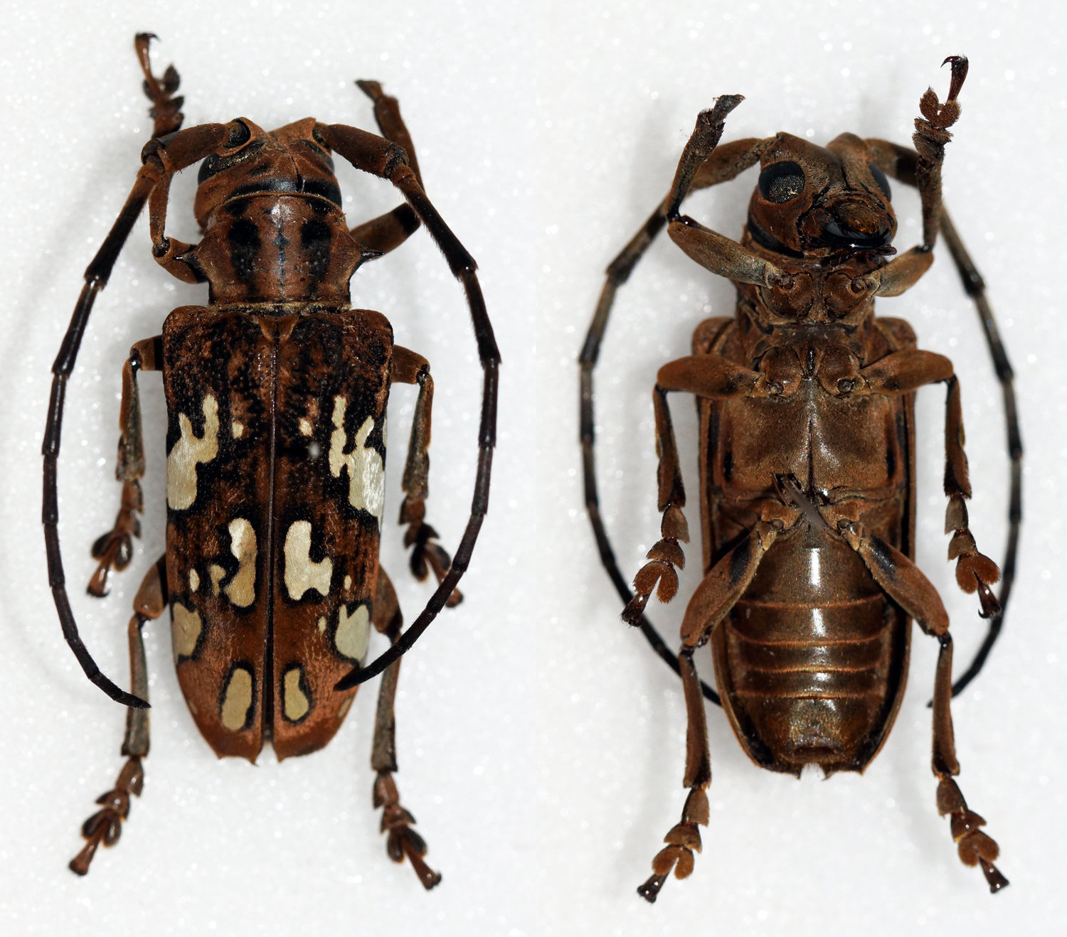 Westwood,1837 Sex: Male Data: 03-2014 - Esperanza agusan - del norte - Mindanao - Philippines Size: ?